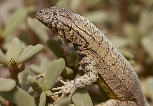 Microlophus peruvianus